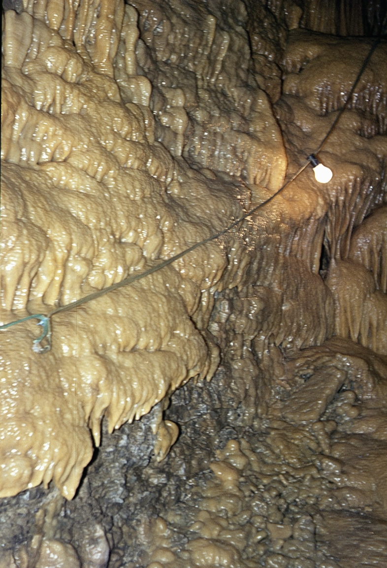 Eberstadter Tropfsteinhöhle: Sinterwand mit provisorischer Beleuchtung während des Ausbaus